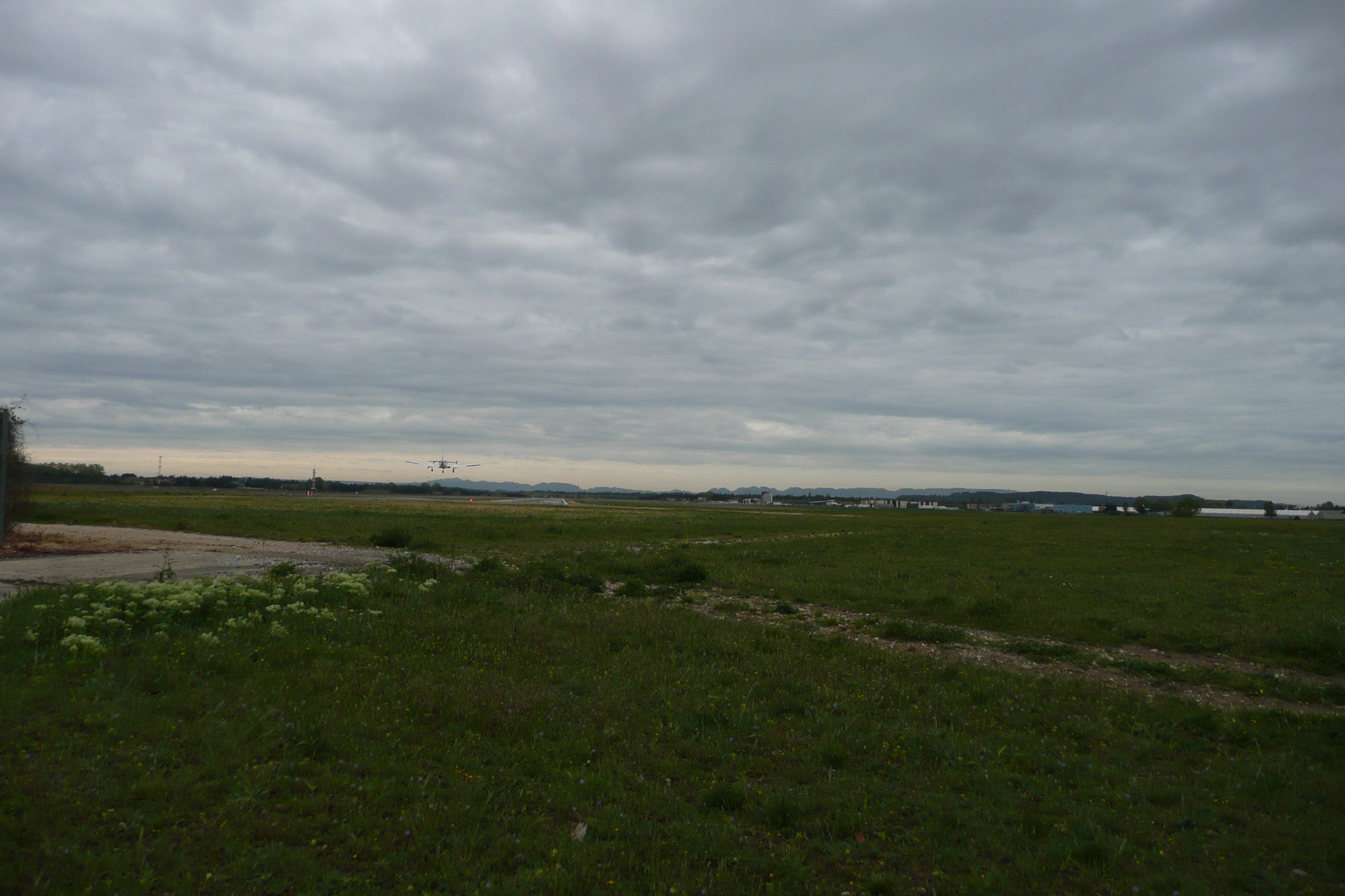 Aéroport d'Avignon près du Golf de Montfavet.